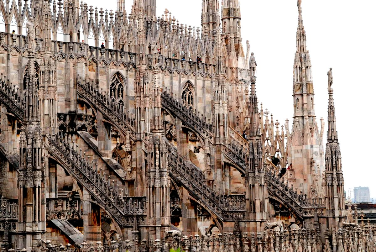 la cattedrale